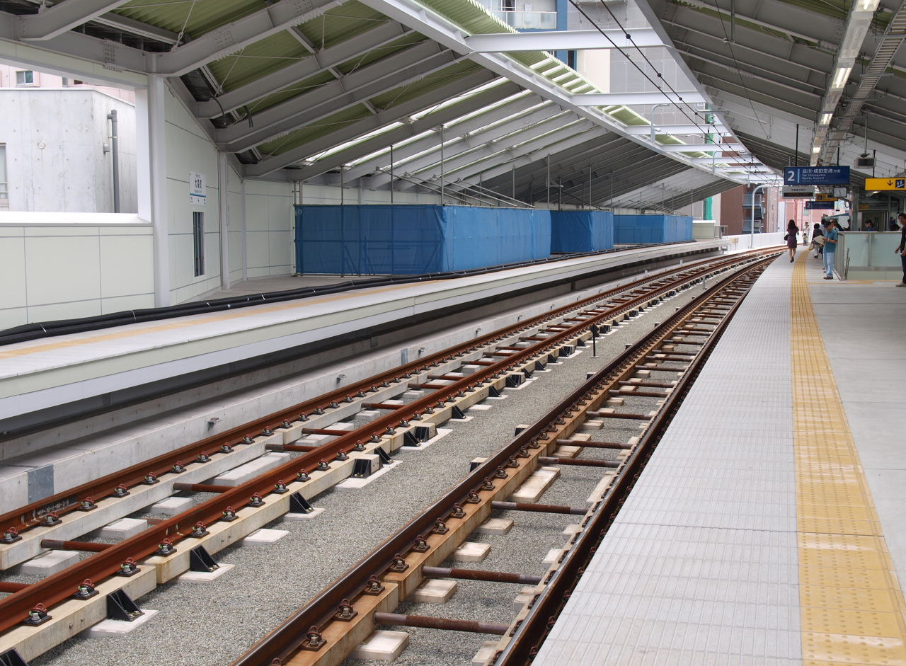 大森町上り高架ホーム